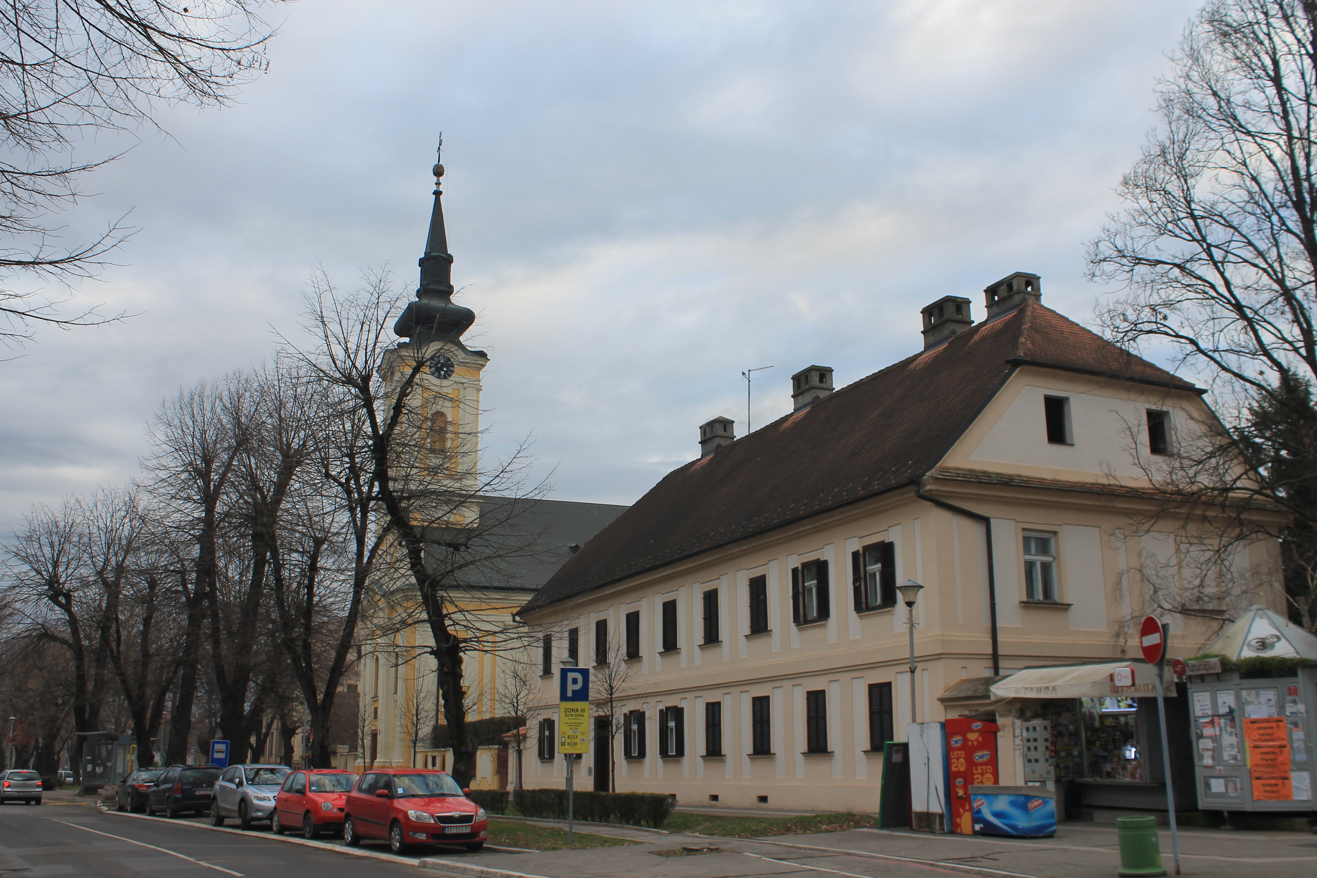 Rimokatolička crkva, Sremska Mitrovica